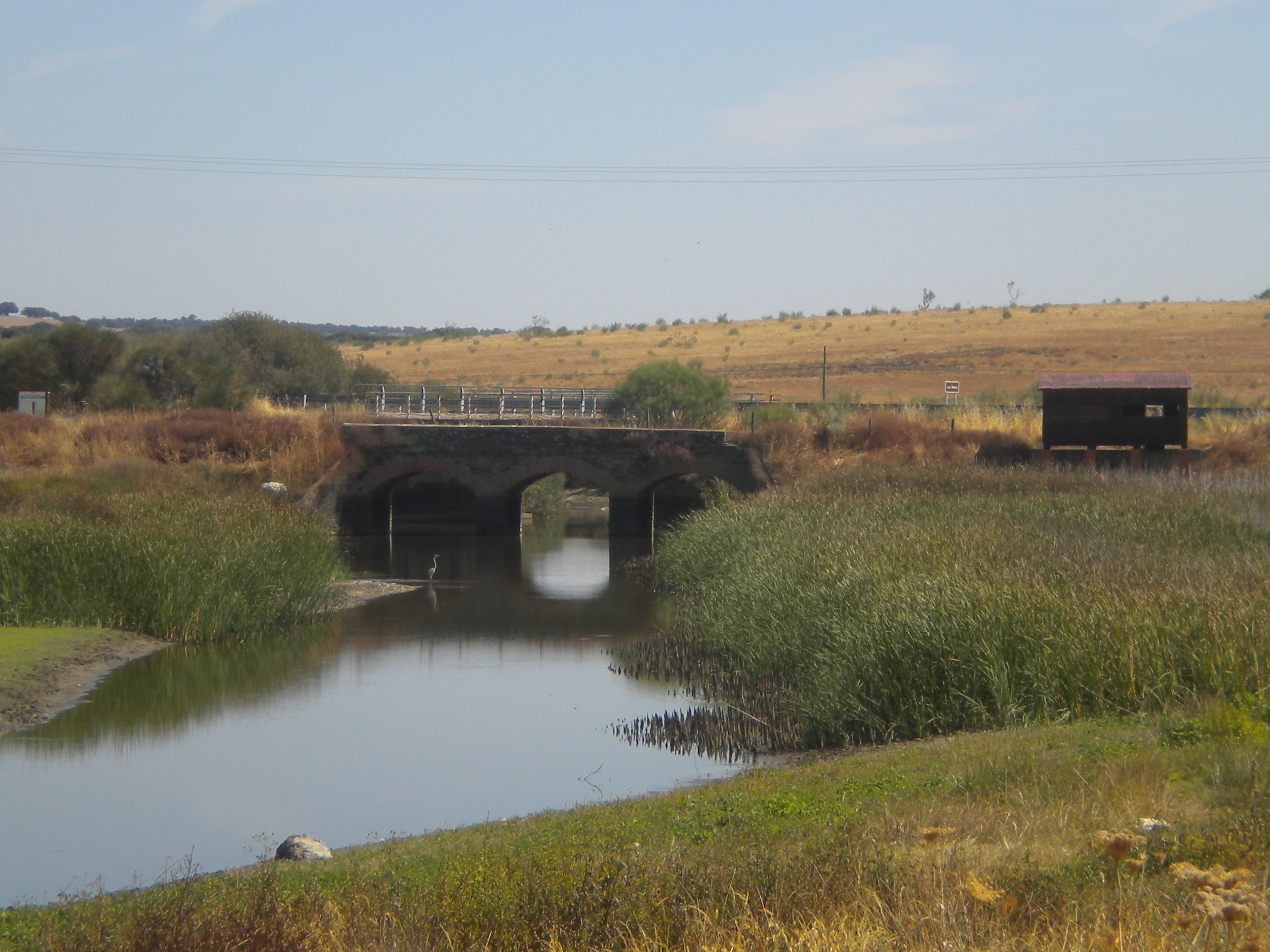 Vista parcial del Embalse de Talaván (Cáceres, España) con mirador de aves y ejemplar de grulla común